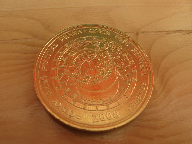 5 tolarů se prodávalo za 200 Kč